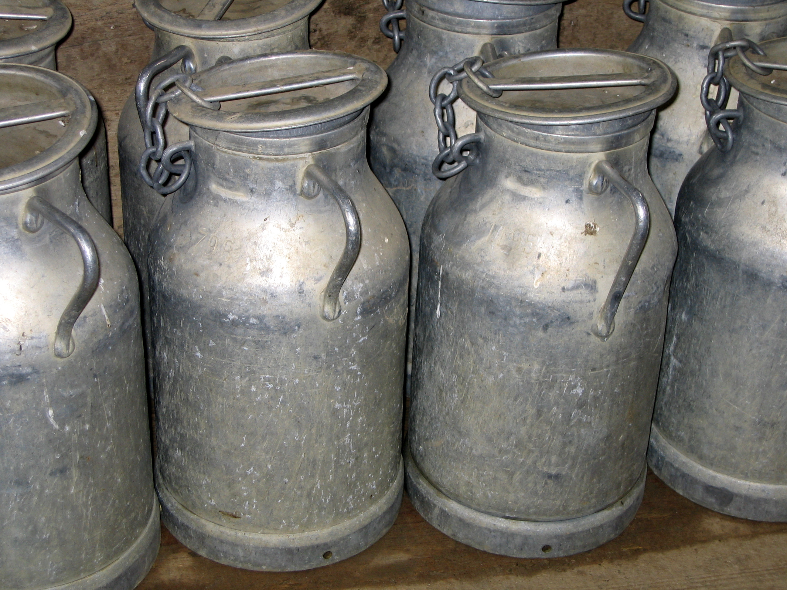 Bidons à lait des années 1960-1970 d'une contenance de 20 litres dans une ferme bourguignonne